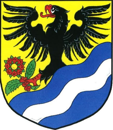 znak, Sudislav nad Orlicí, okres Ústí nad Orlicí